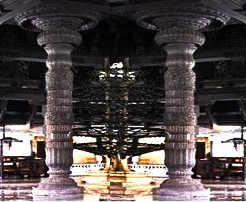 നമസ്കാര മണ്ഡപത്തിലെ ഒറ്റക്കൽതൂണ്